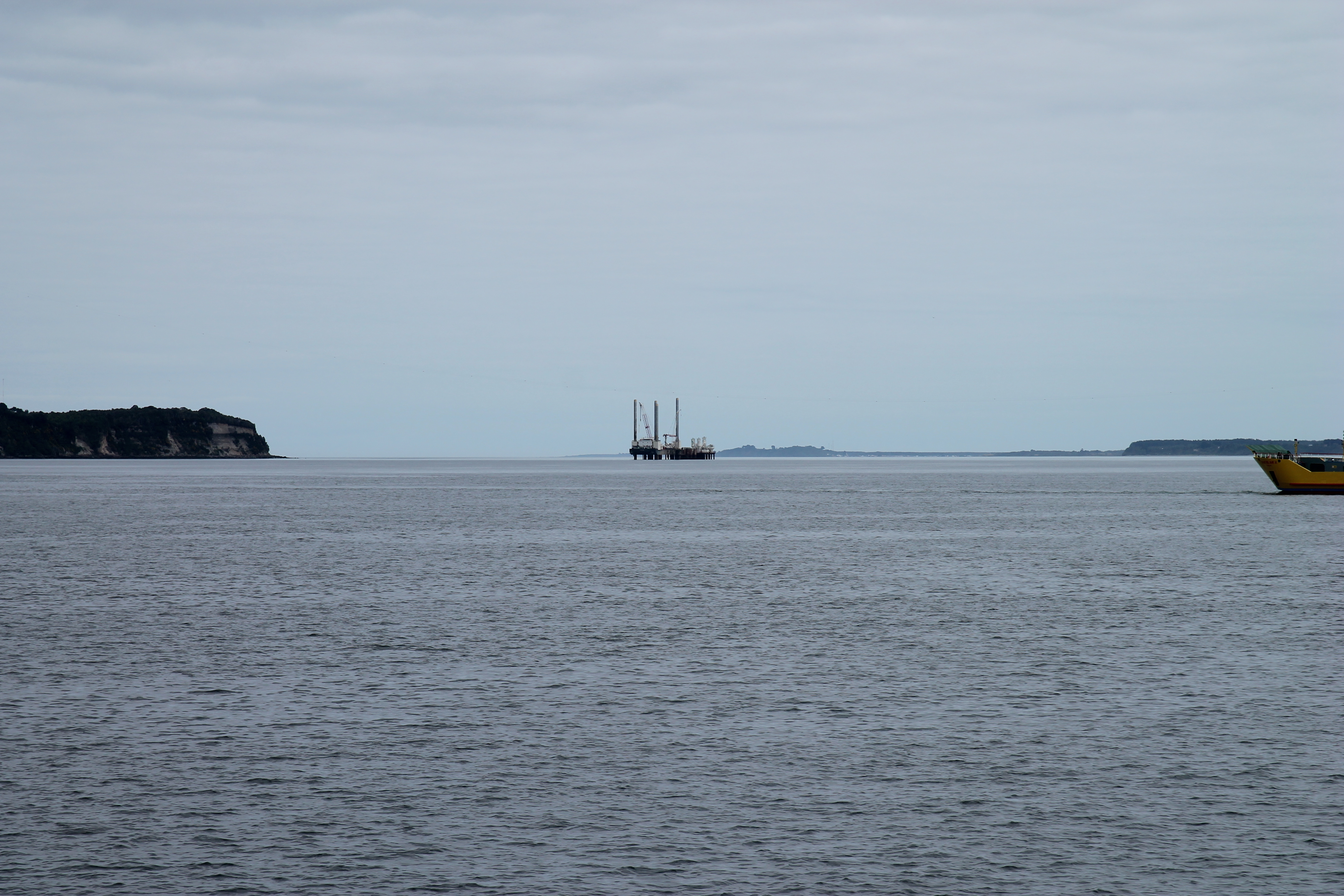 Průliv Chacao, stavba mostu